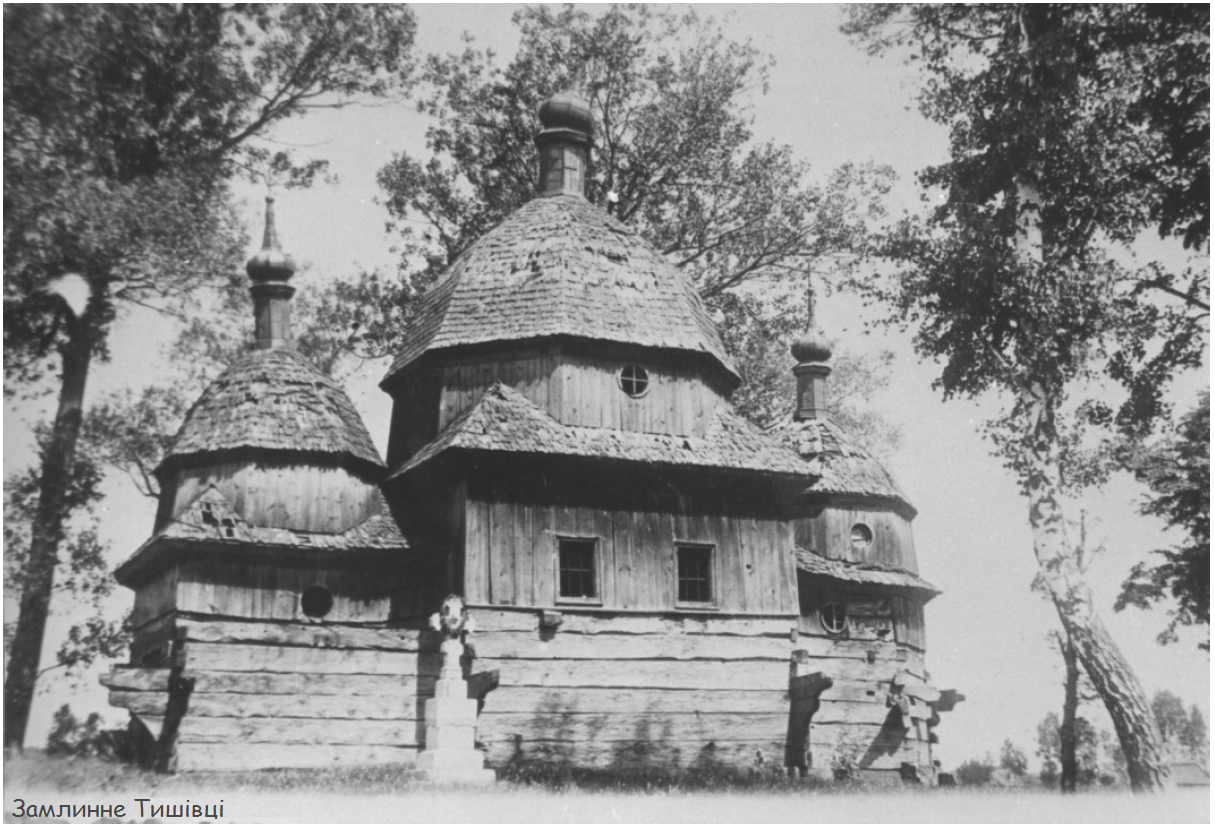 Церква. Замлинне Тишівці зображення 1938 року